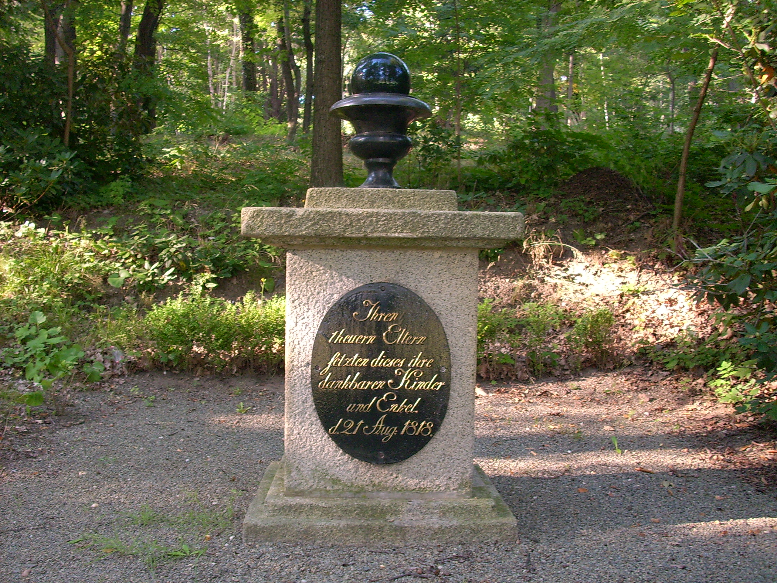 Gedenkstein an der Gruft der Adelsfamilie von Zehmen im Schlosspark in Weißig, Ortsteil von Oßling